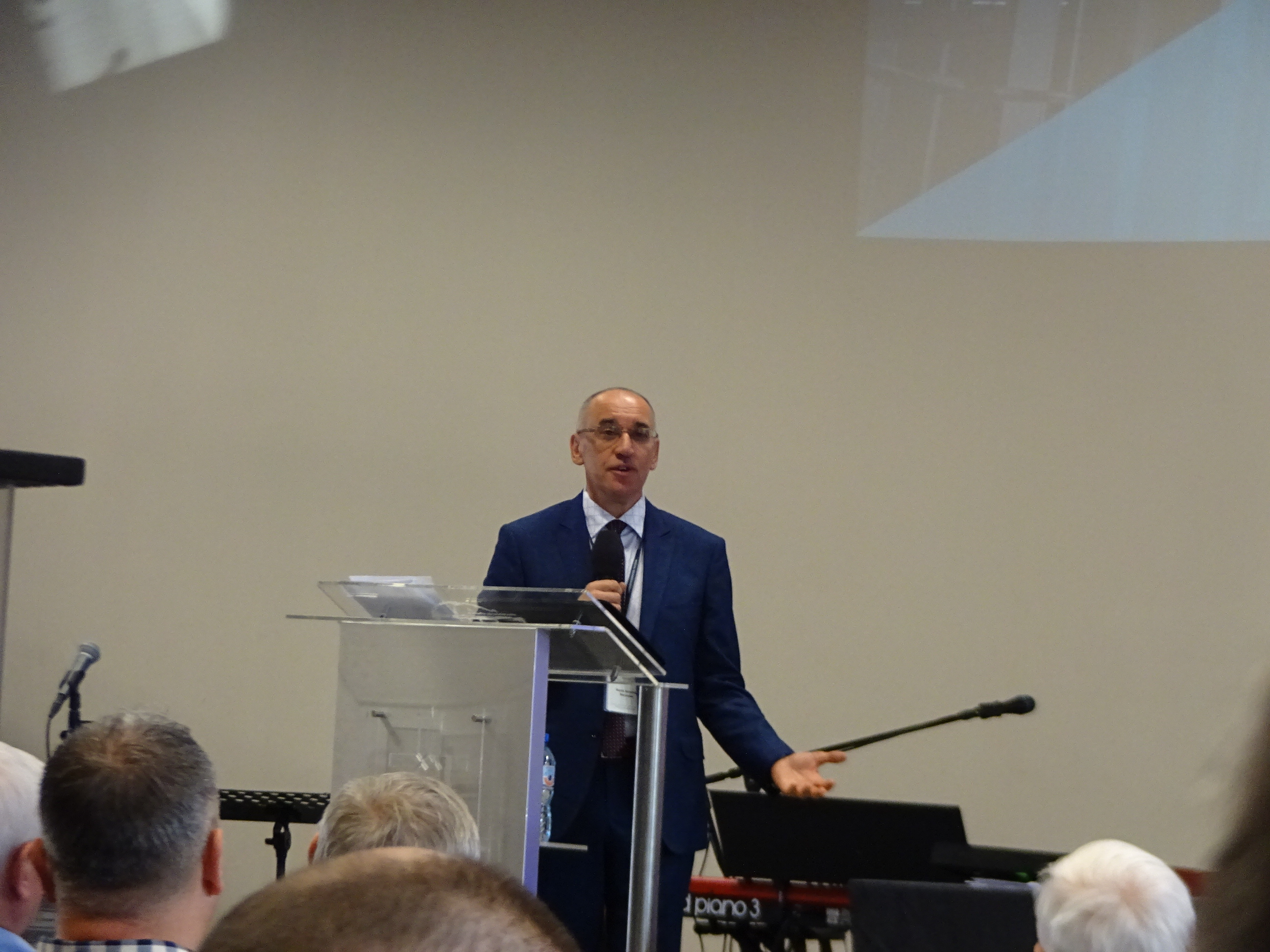 Synod Kościoła Zielonoświątkowego, drugi dzień, 2018-09-28.